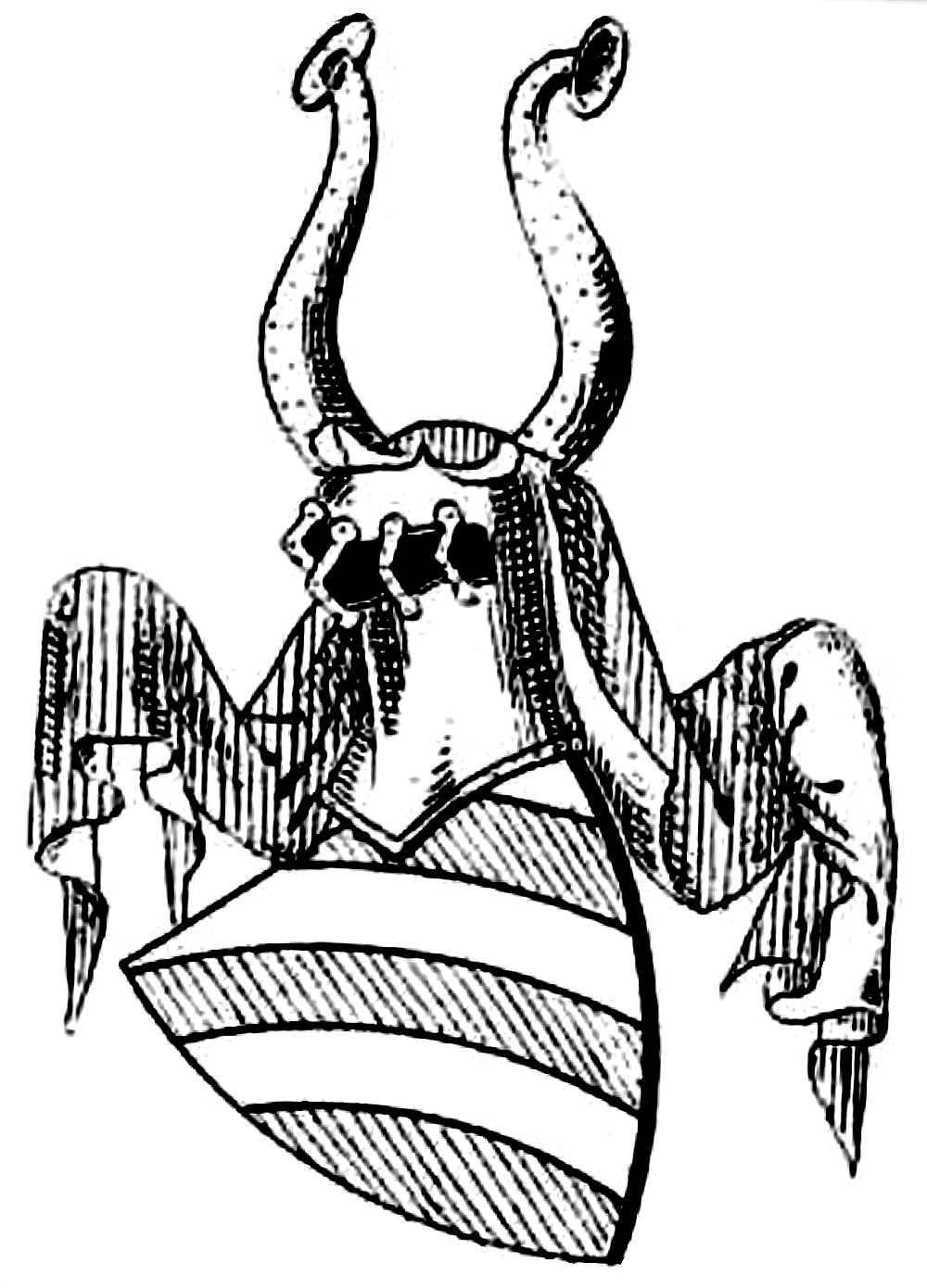 Wappen derer von Capellen